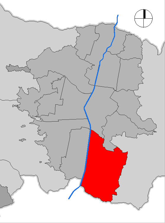 mapa de la comuna El Poblado. Medellín, Colombia.